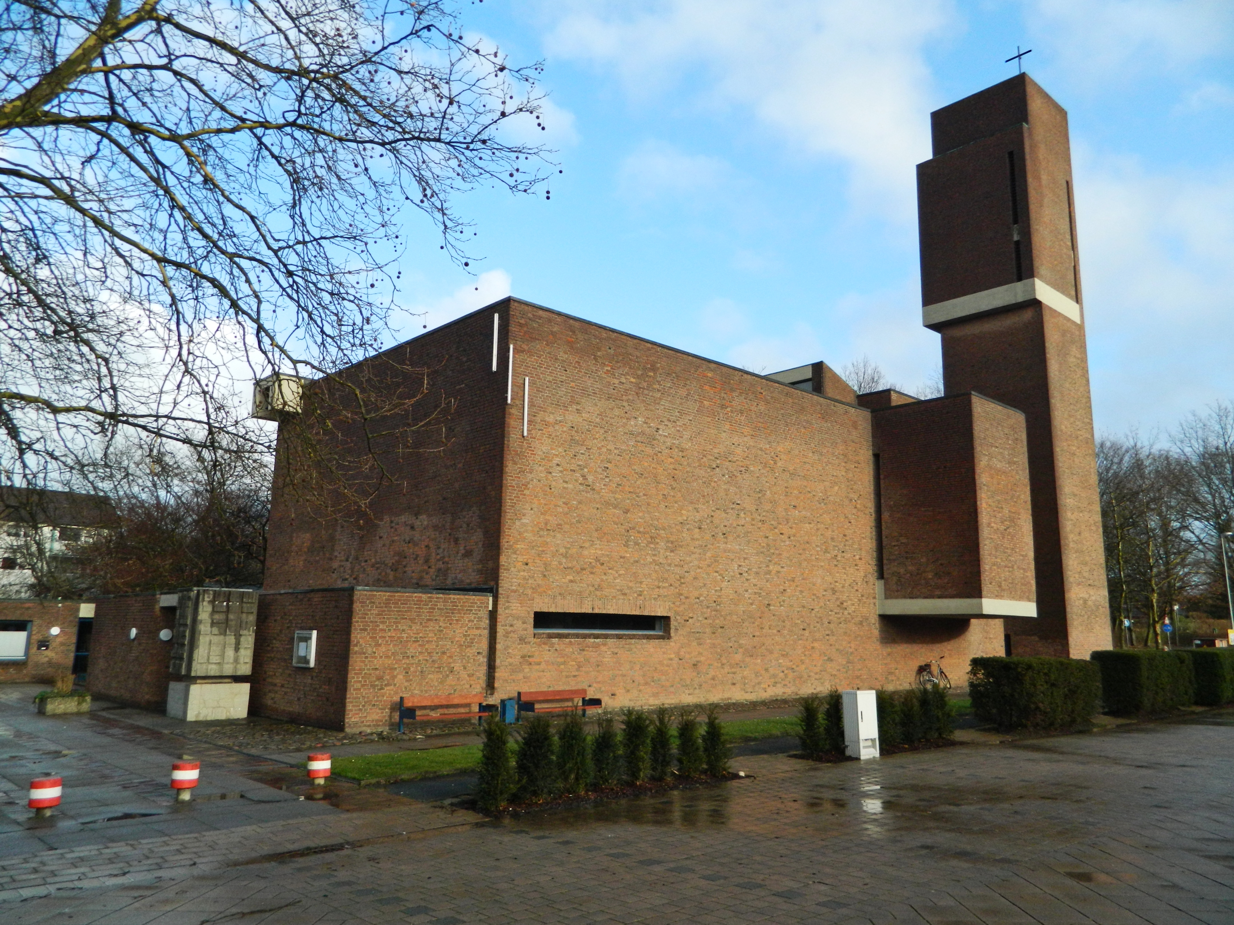 Reinbek, Germany